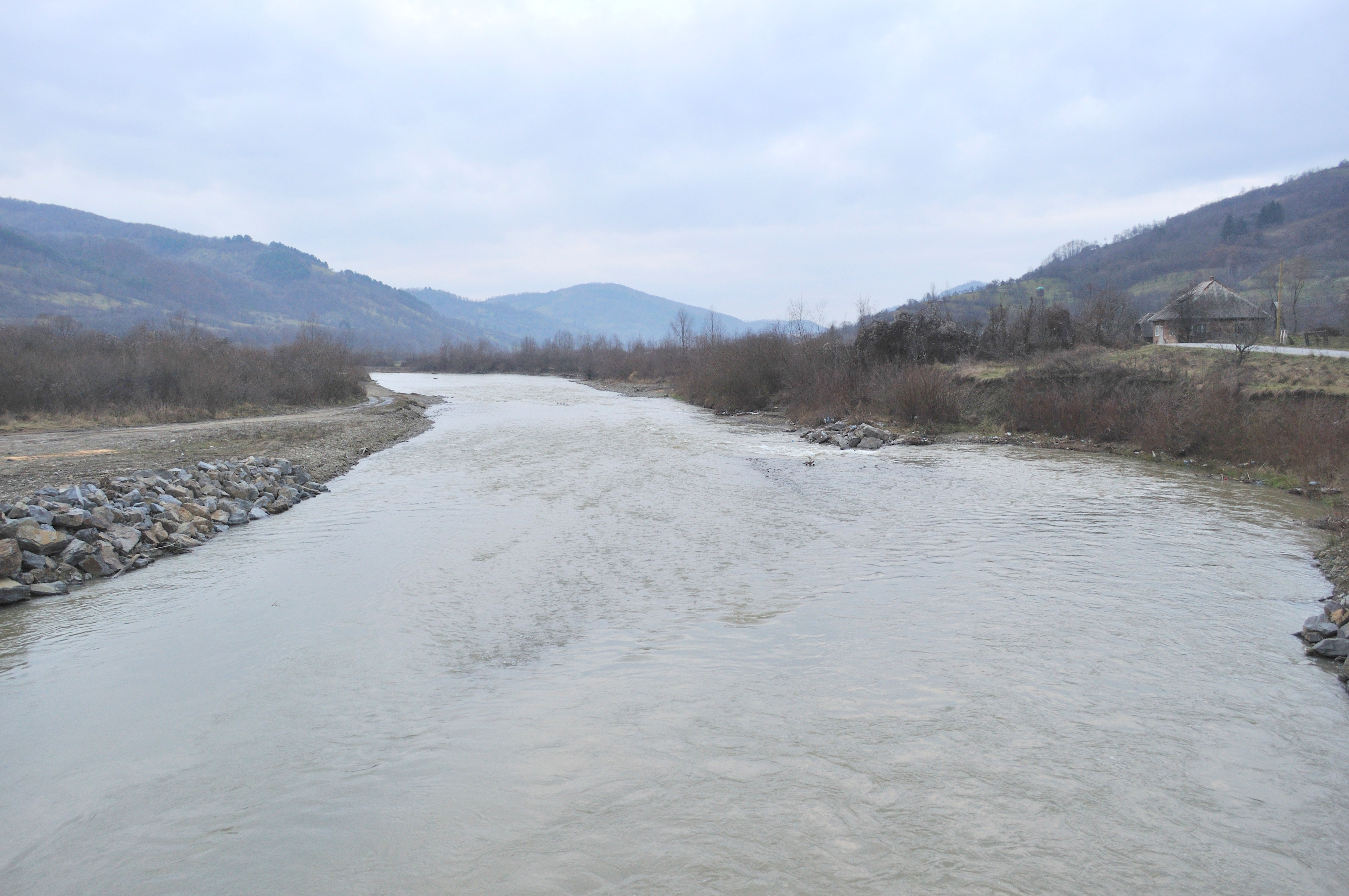 râul Iza la Strâmtura, județul Maramureș